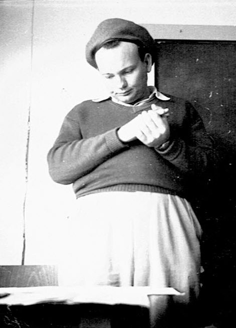 שמעון בר חמא בעת שעור בבית הספר הריאלי בחיפה